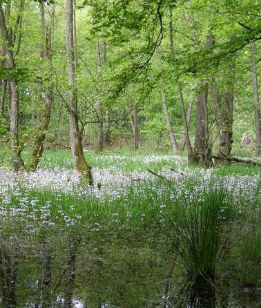 Blick in das Naturschutzgebiet Neuendorfer Moor